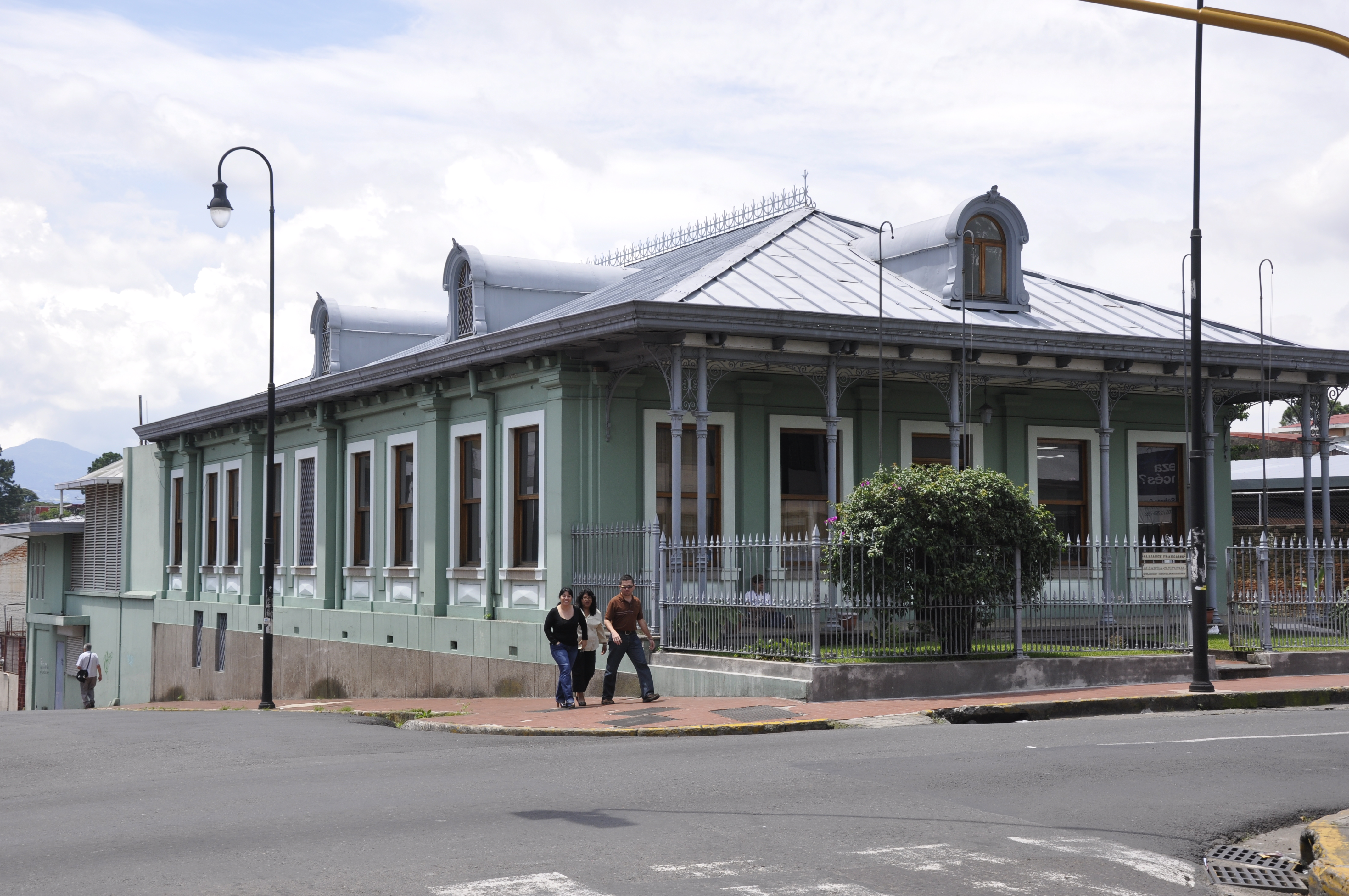 Sede de la Alianza Francesa, Barrio Amón, San José, Costa Rica.